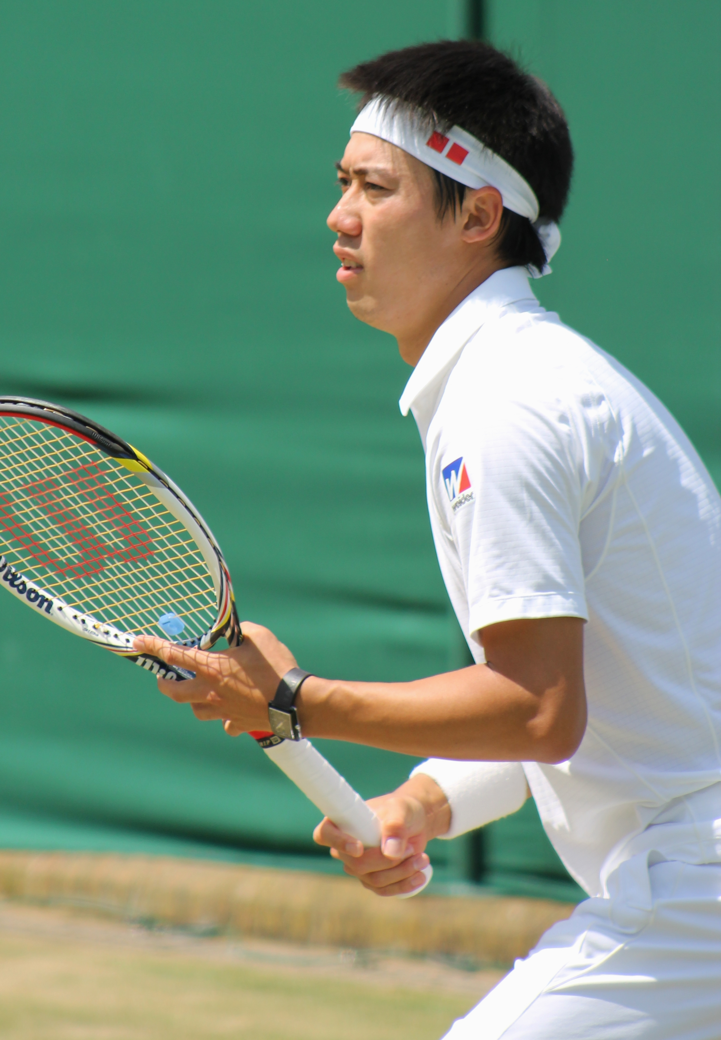 Nishikori WM13-009